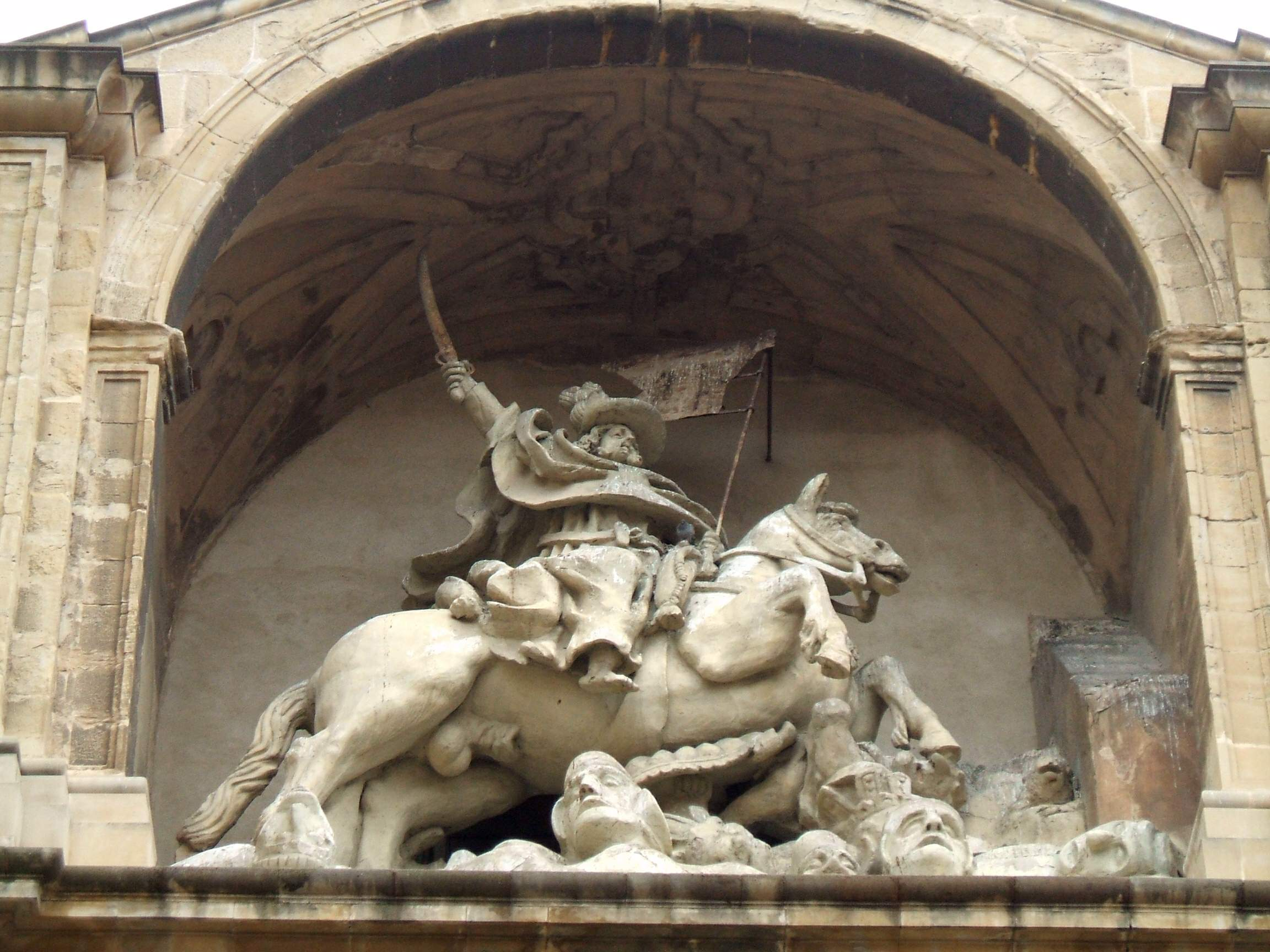 Church of Santiago, Logroño